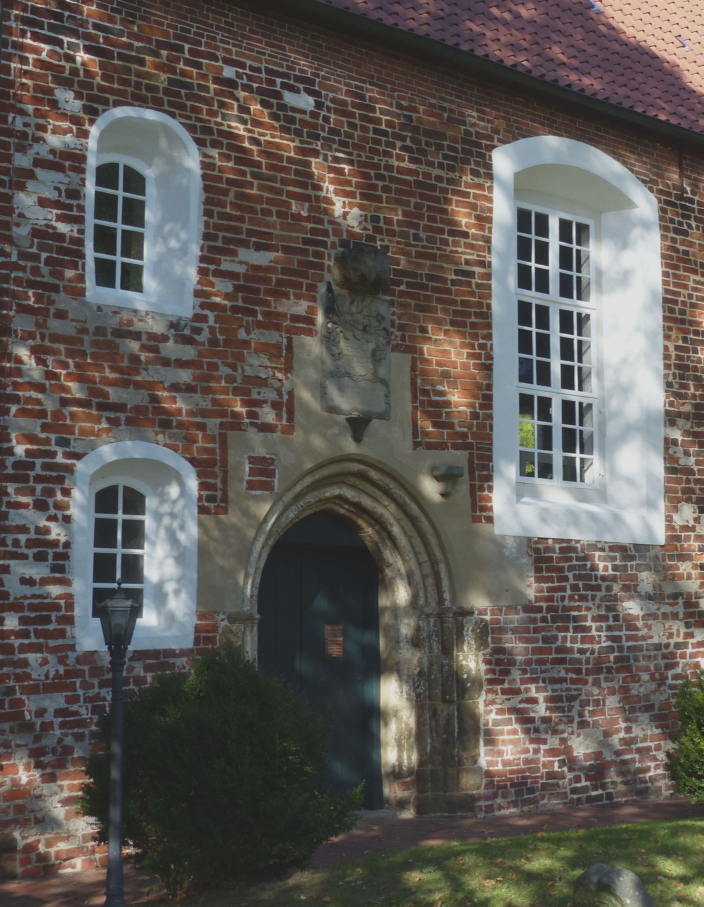 Kirche Dedesdorf, frühgotisches Sandsteinportal